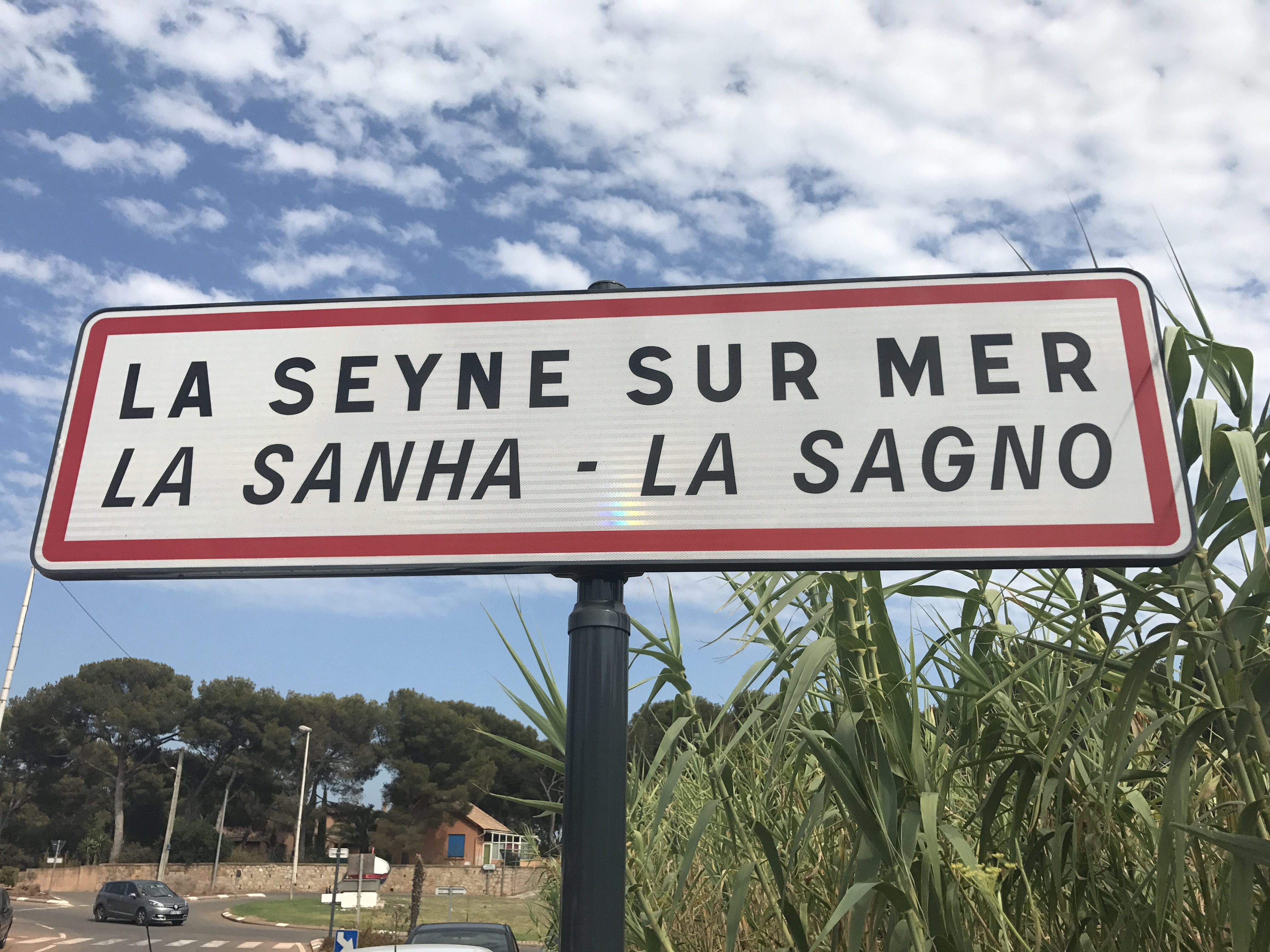 Panneau d'entrée dans La Seyne-sur-Mer.